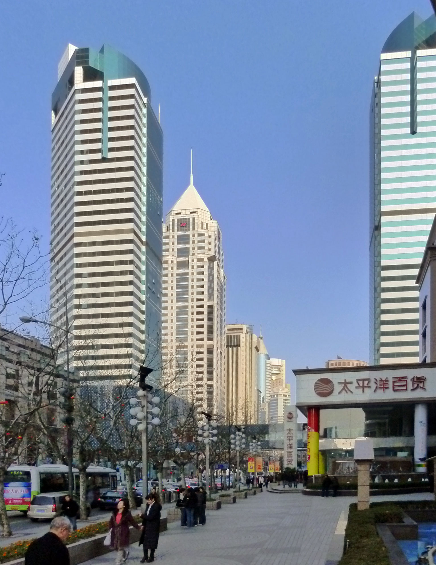 霞飛路 (上海)